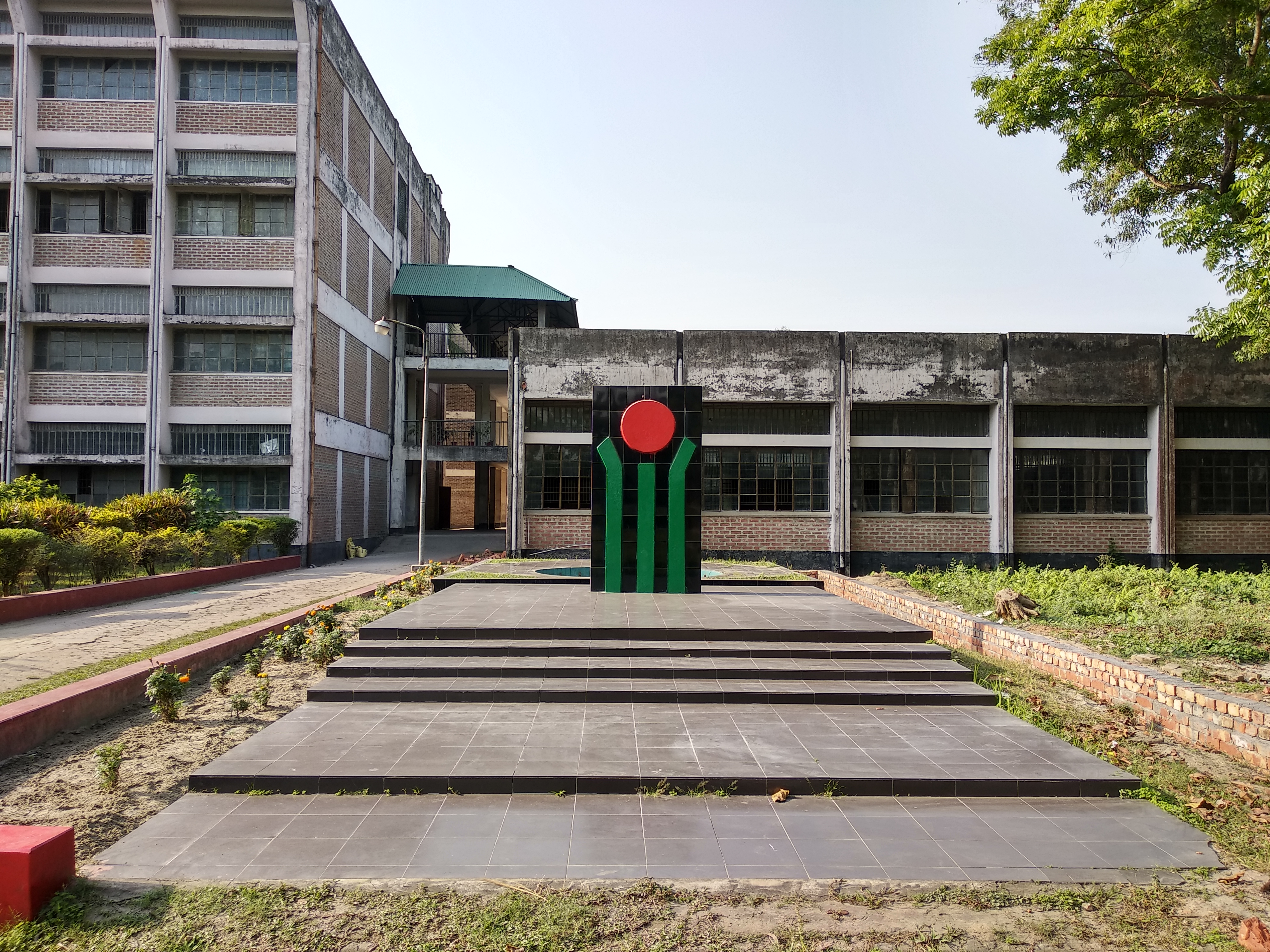 টাঙ্গাইল পলিটেকনিক ইন্সটিটিউট এর শহীদ মিনার।